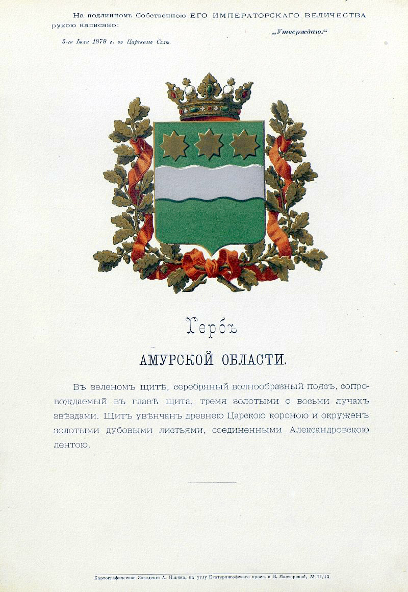 Official Russian Empire coat of arms Amur Oblast. Герб Российской Империи Амурской области с официальным описанием в Гербовнике Министерства внутренних дел Российской Империи 1880 года. Утверждён Императором Всероссийским Александром Вторым в 1878 году.